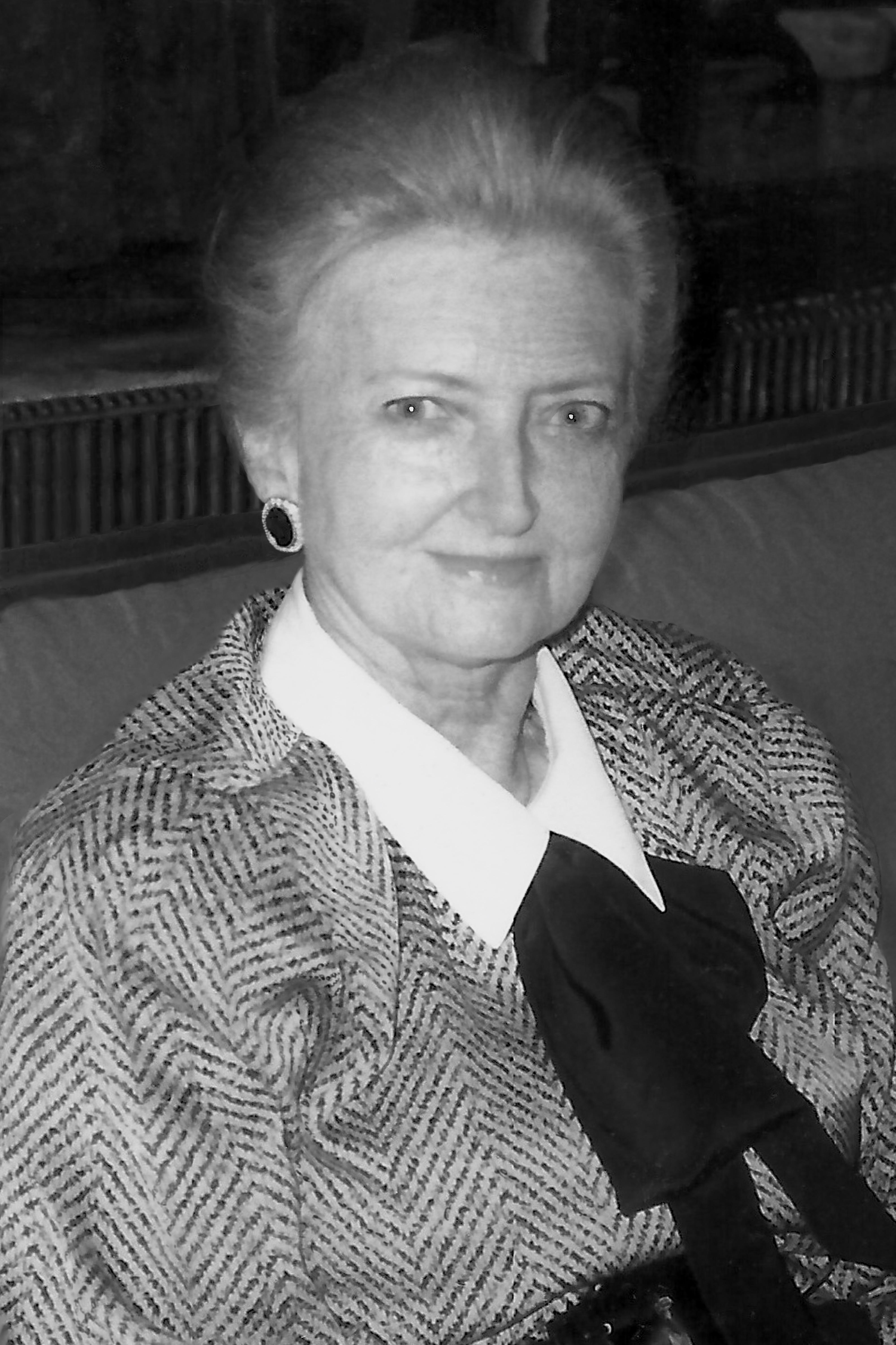 Elena Larrain, últimos años.